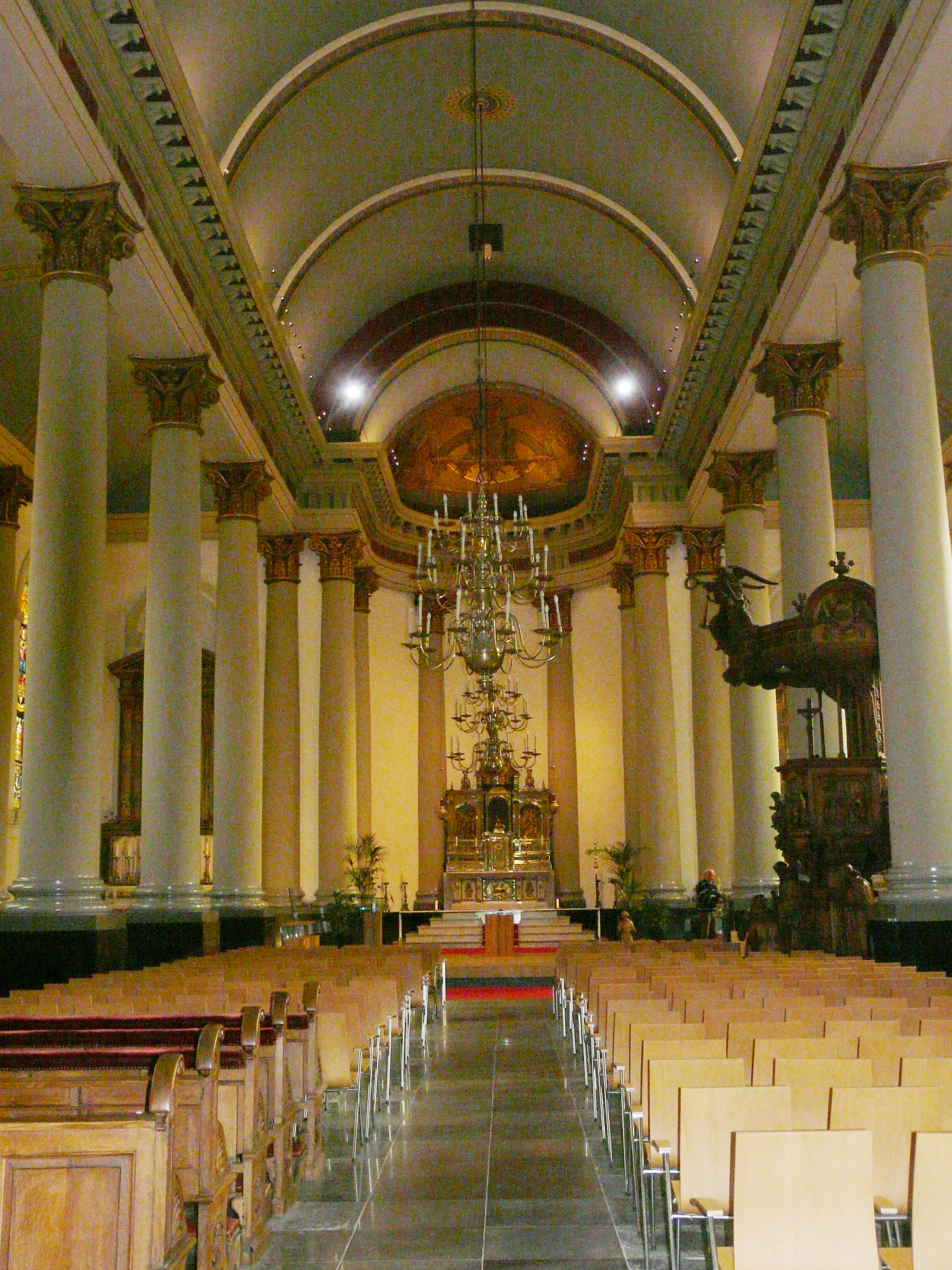 Sint-Antoniuskathedraal in Breda Centrum in Breda